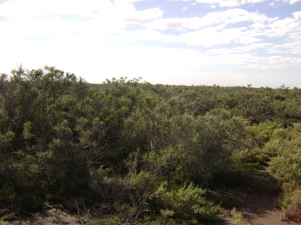 Zona de matorrales cercana a la costa maritima